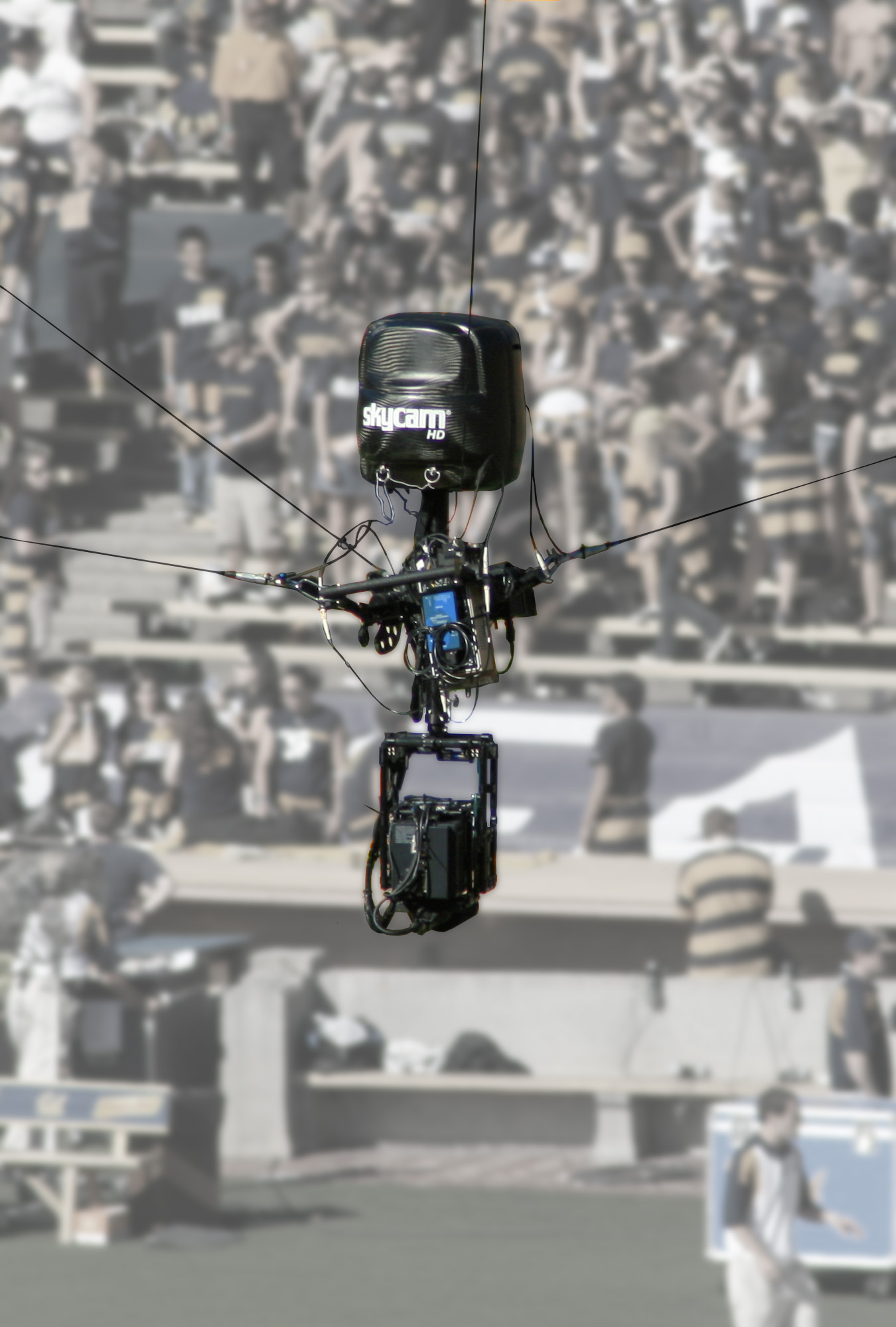 SkycamHD suspended video device